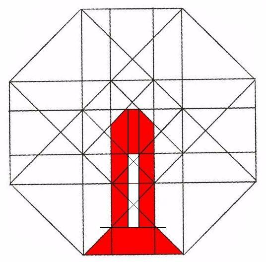 As linhas que compõem o formato do desenho do logotipo da Ordem de Cristo podem ser obtidas a partir da ligação com retas dos vértices no interior do polígono octógono, associado a linhas paralelas aos lados.